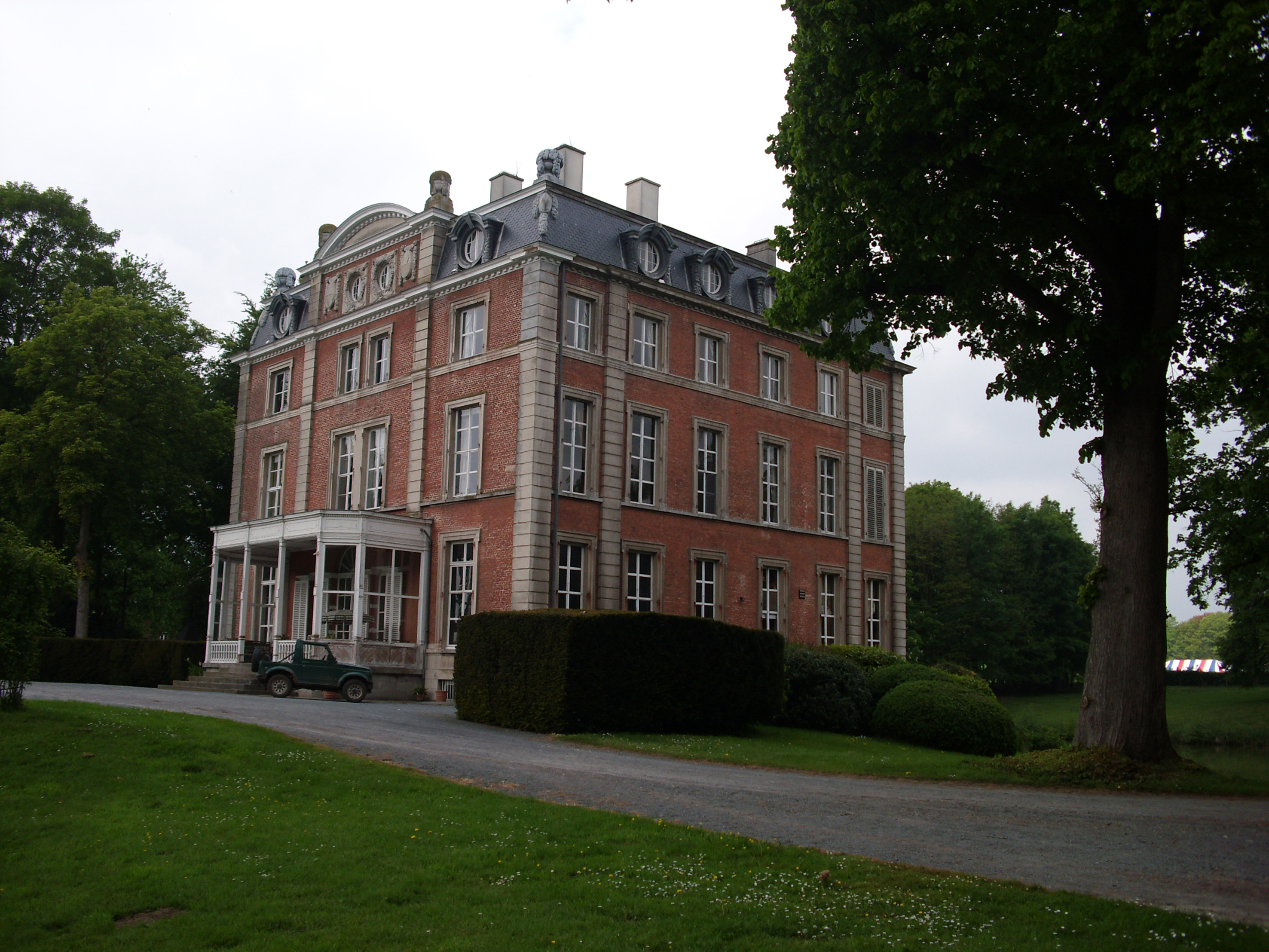 Kasteel van Lozer (kant van het park), gelegen in het vroegere Huise. Thans een deel van Kruishoutem. Reeds 350 jaar in het bezit van de familie della Faille d'Huysse.